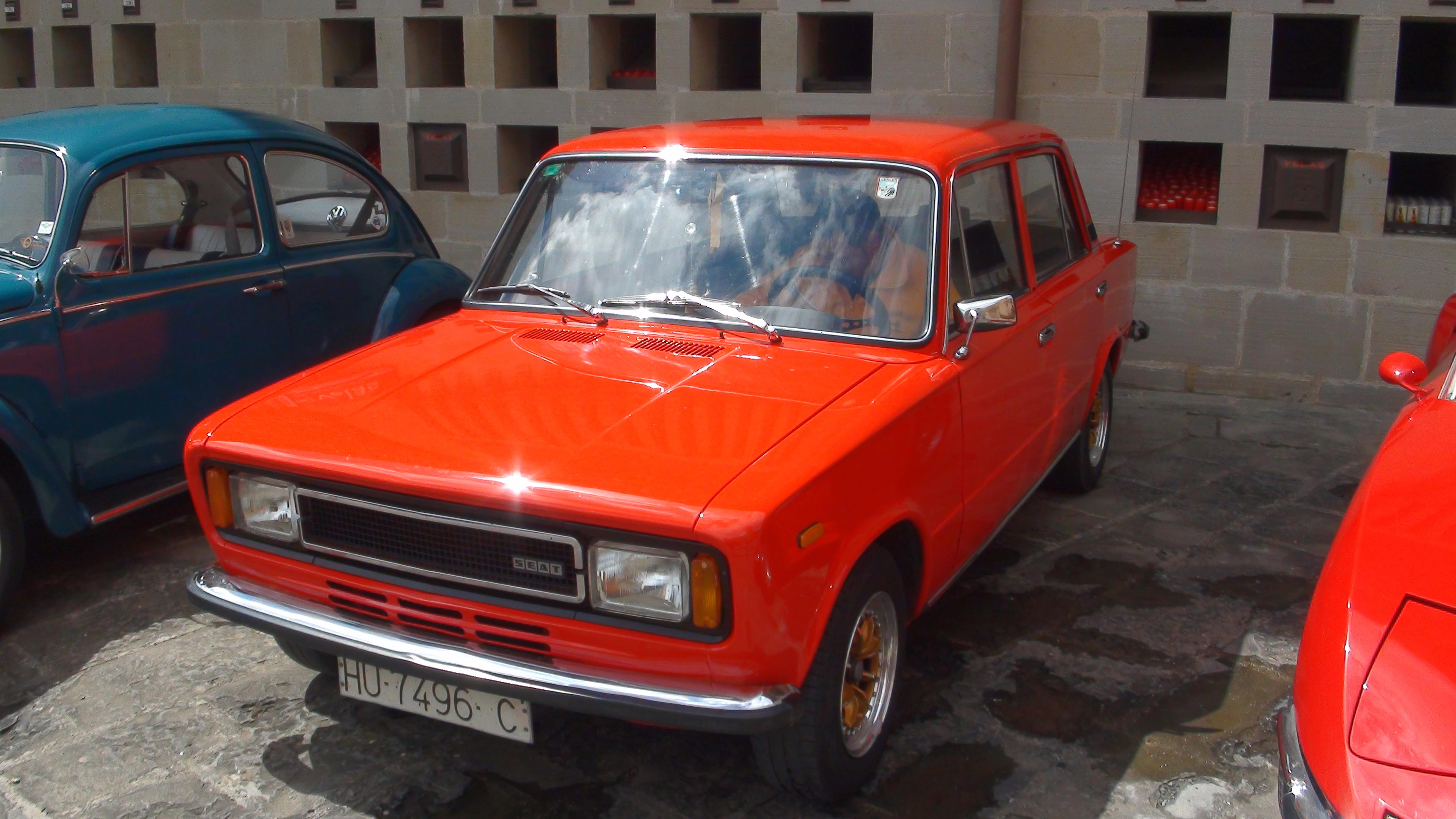 Coches clásicos en Torreciudad - 87